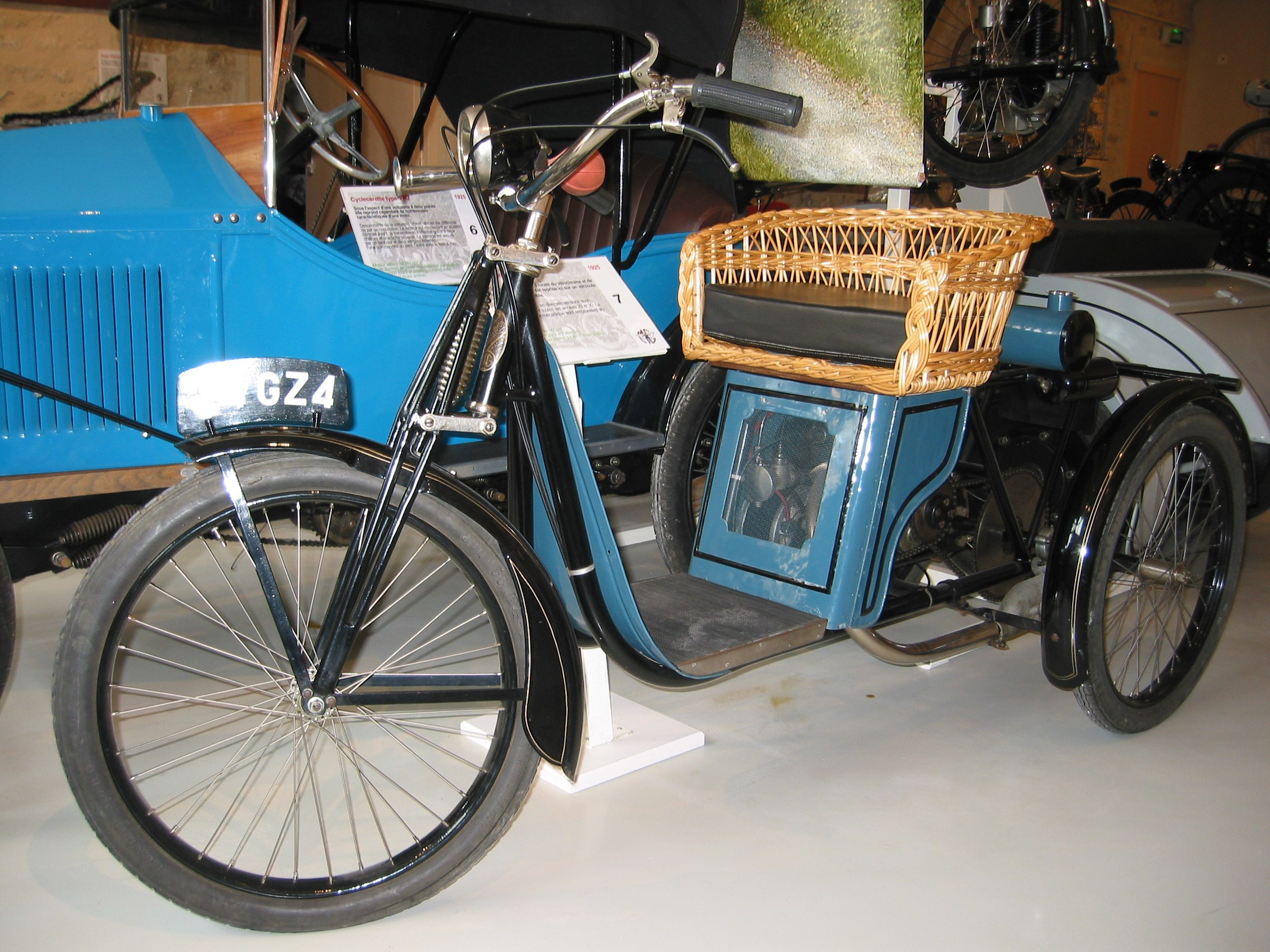 Monet-Goyon Automouche 1925. Collction Monet-Goyon, ville de Melle, département des Deux-Sèvres, France.